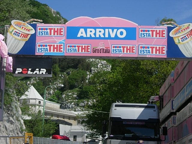 Arrival at Montevergine, Giro d'Italia 2007